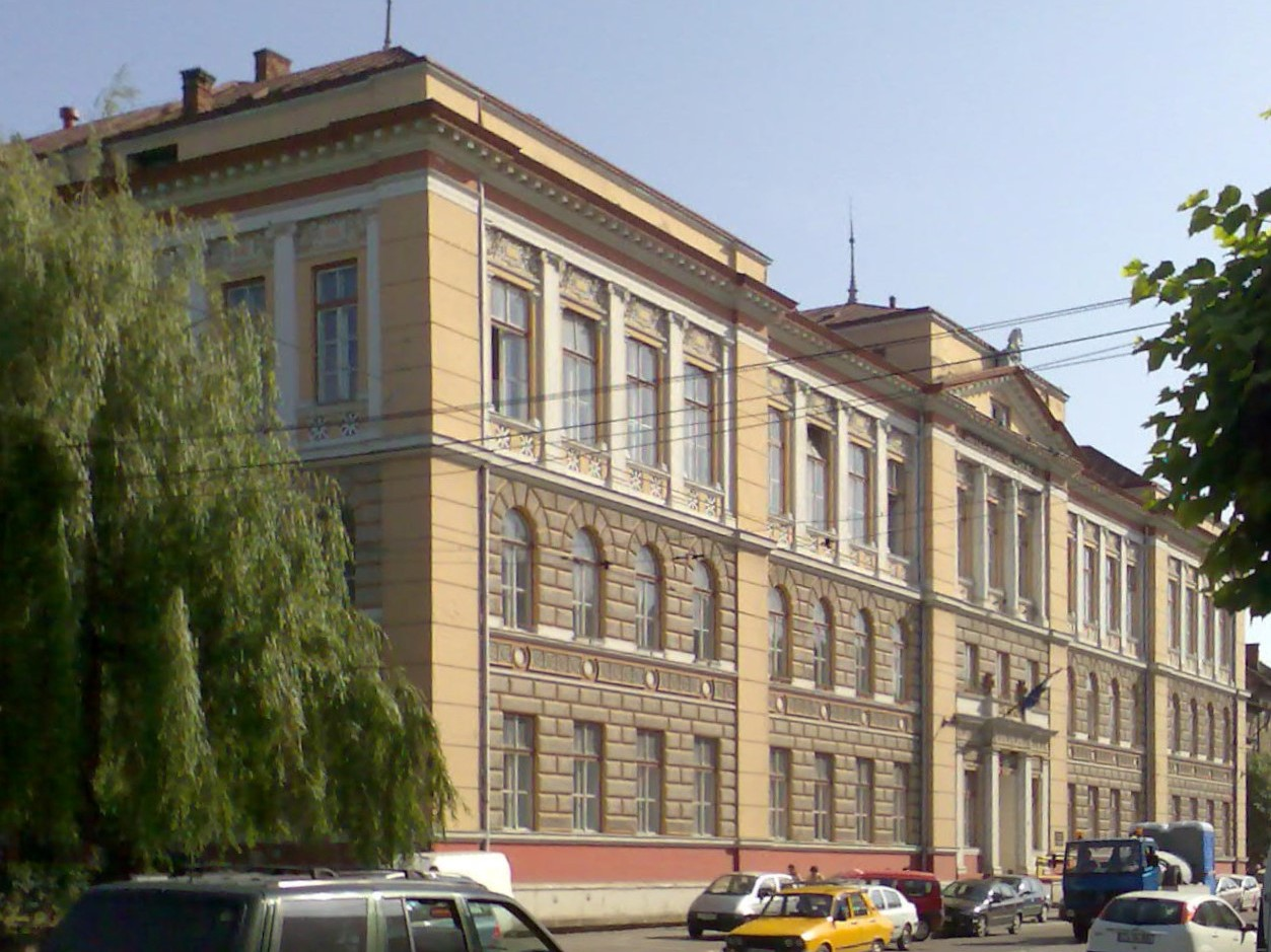 A kolozsvári Műszaki Egyetem egyik épülete a Malom utcában